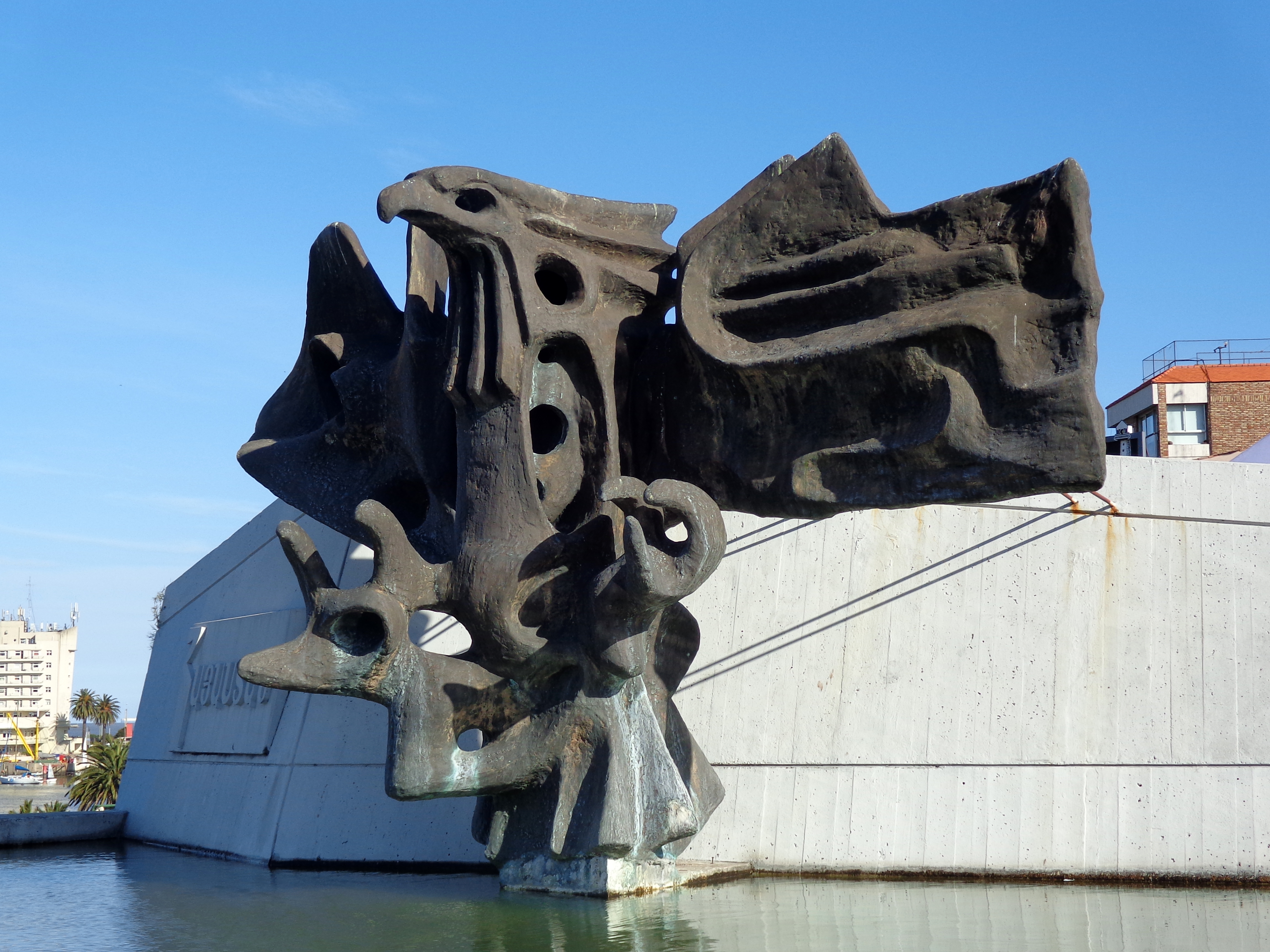 Homenaje de la Colectividad Armenia al Uruguay. Ubicada en el departamento de Montevideo